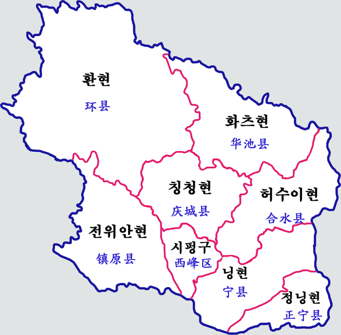 칭양시 현급구역도